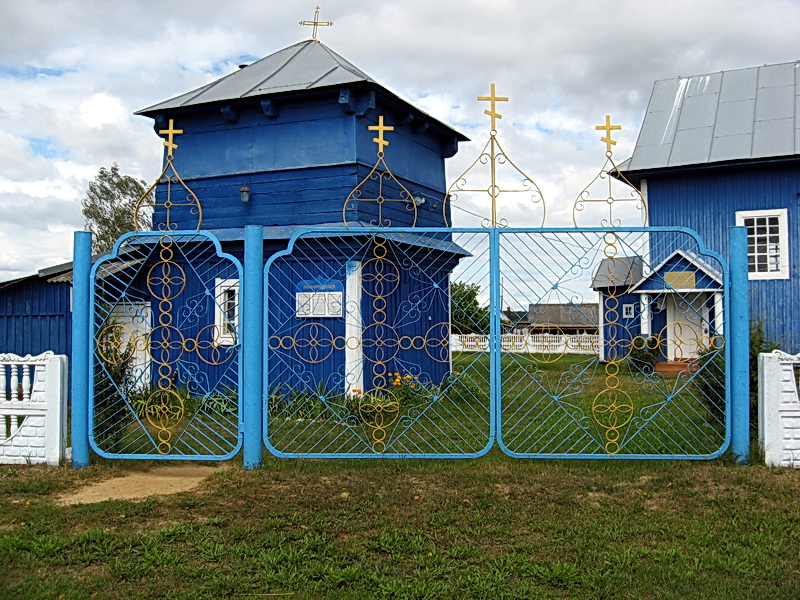 Вавулічы. Свята-Раства-Багародзіцкая царква